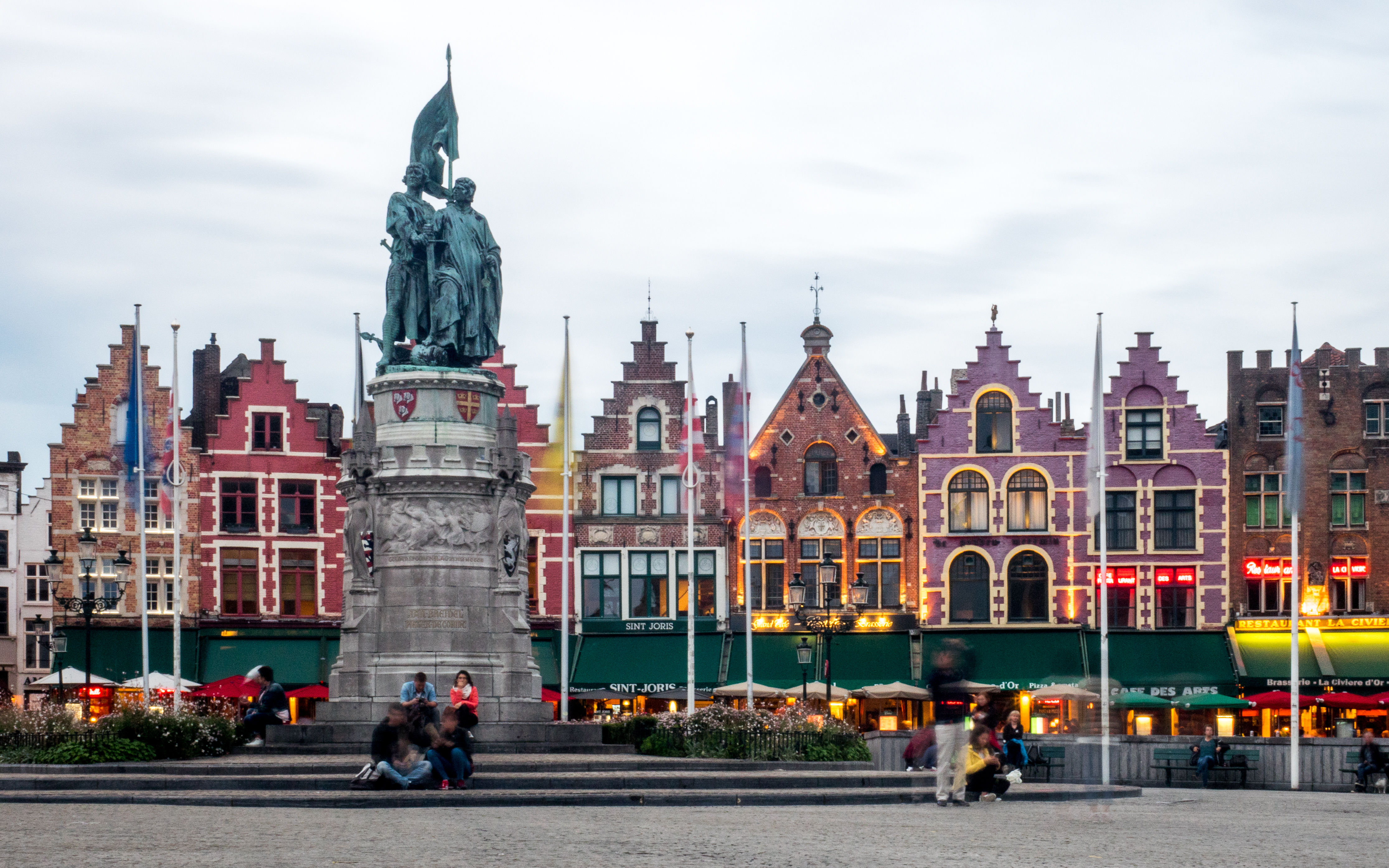 Bruges (Belgium): Markt (Market Place) and statue of Jan Breydel and Pieter de Coninck